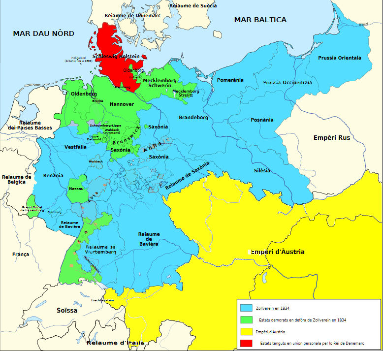 Extension de Zollverein en 1834.